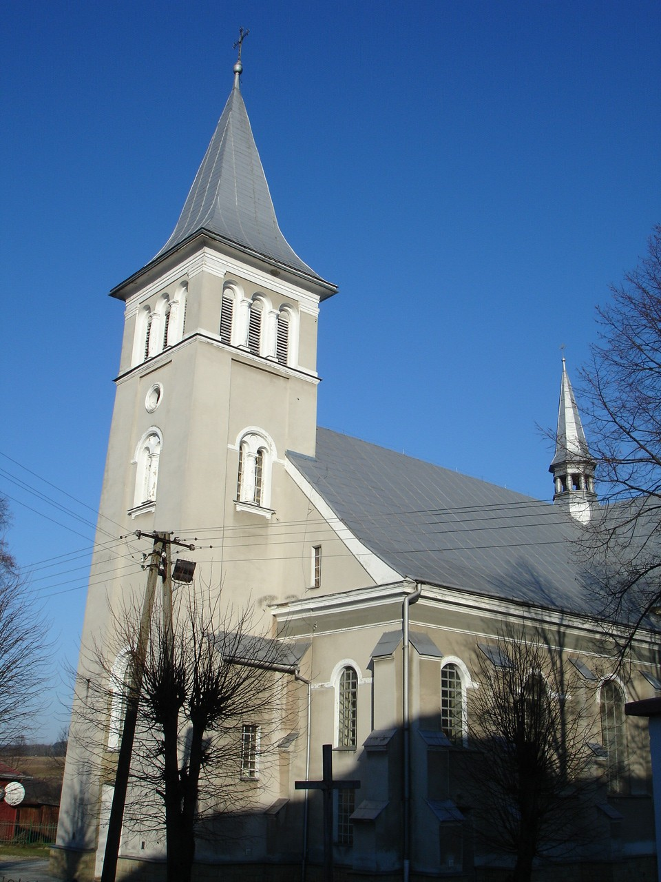 Łaciński kościoł parafialny w Birczy